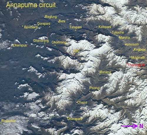 אנאפורנה Annapurna circuit